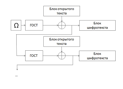 Схема режима гаммирования с обратной связью ГОСТ 28147-89